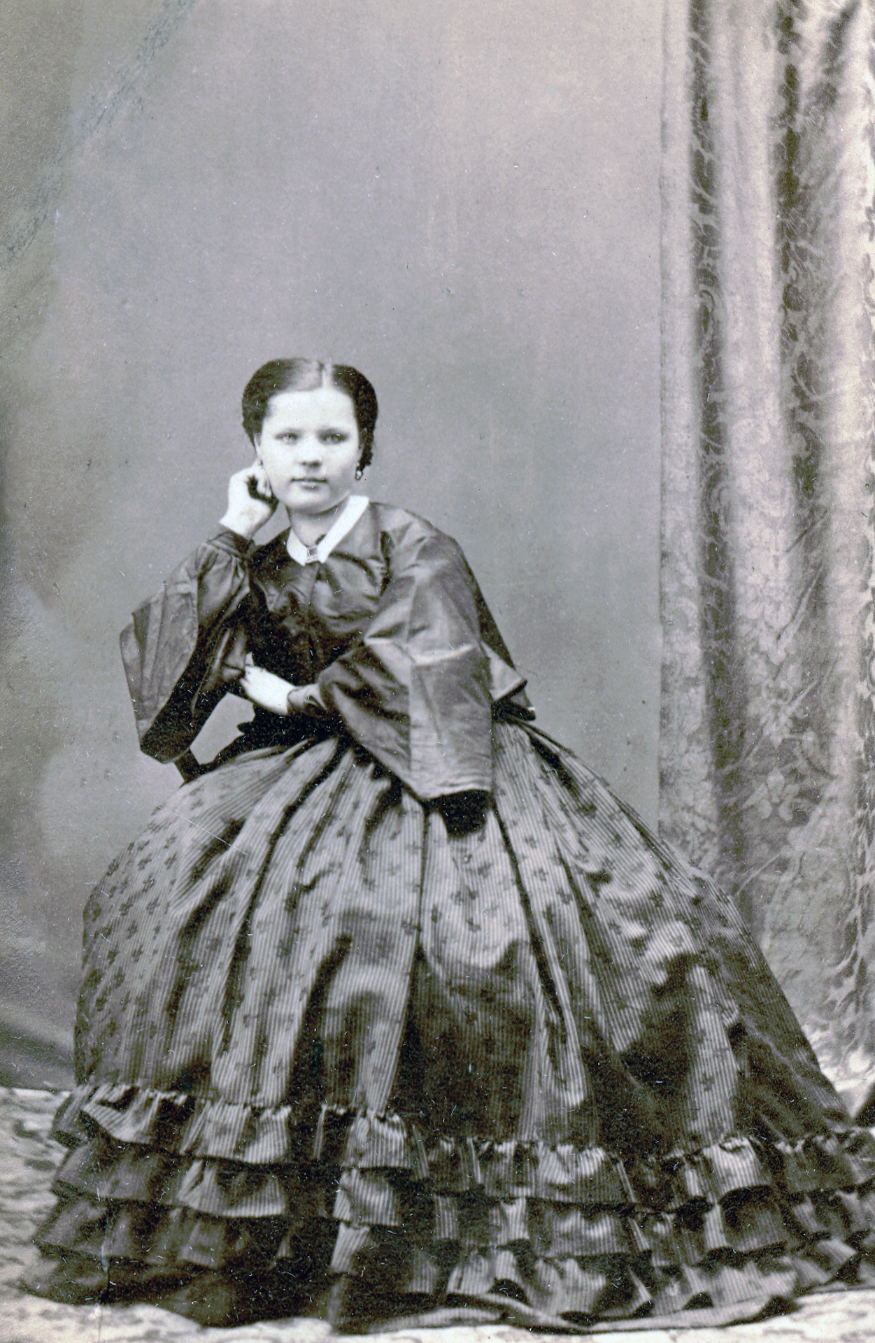 Olga Sandberg, dansare vid Kungliga Operan 1862.